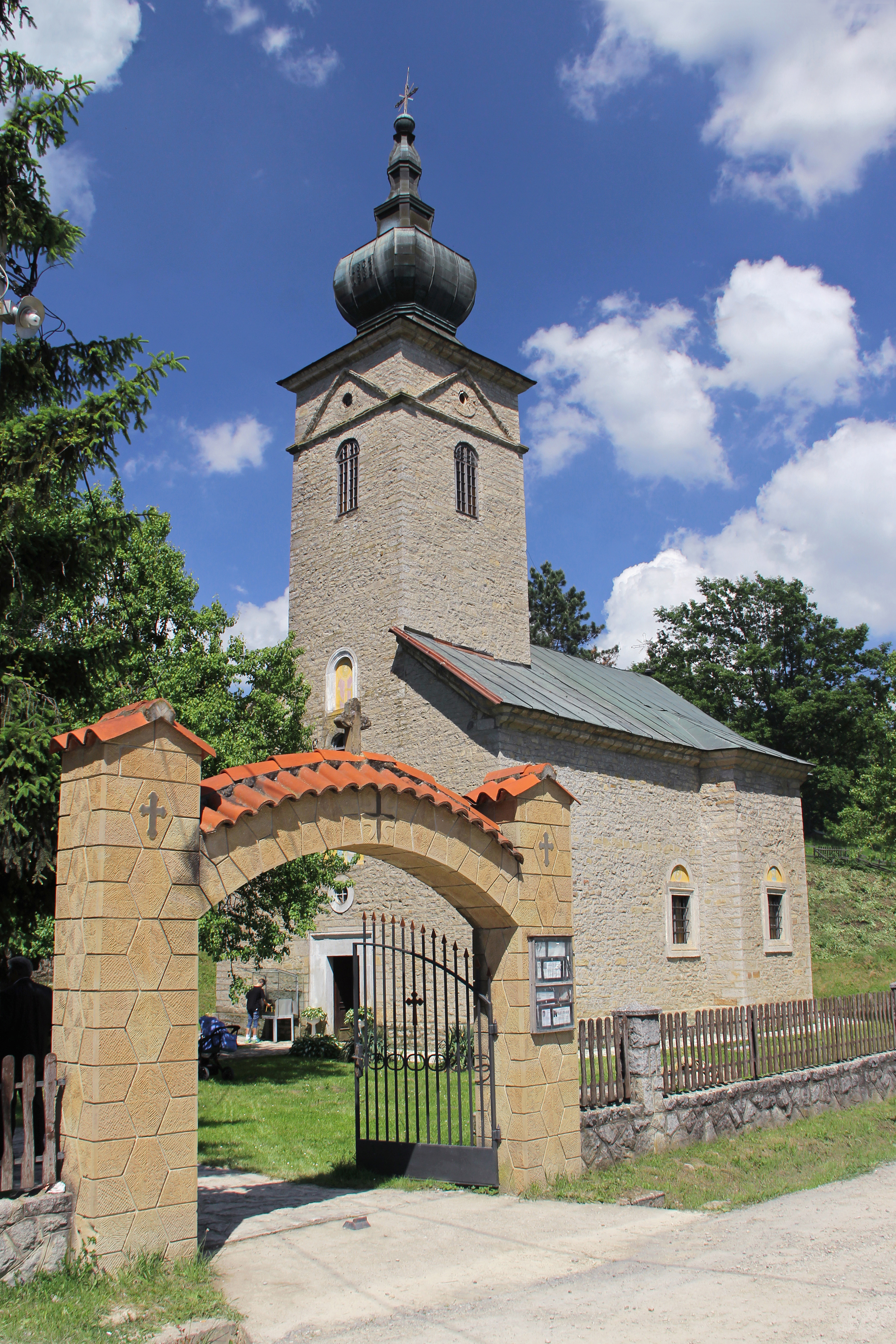 Boljkovci kod Gornjeg Milanovca, Crkva Svetog Nikole